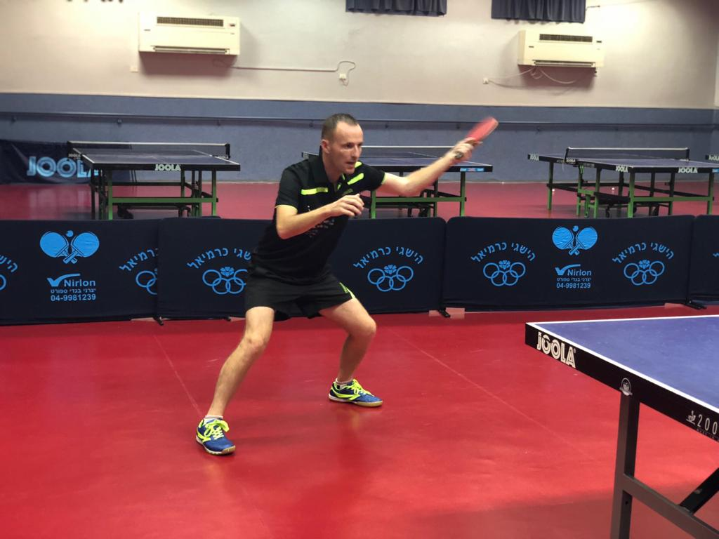 שמעון רבינוביץ' בעת חבטת גב יד